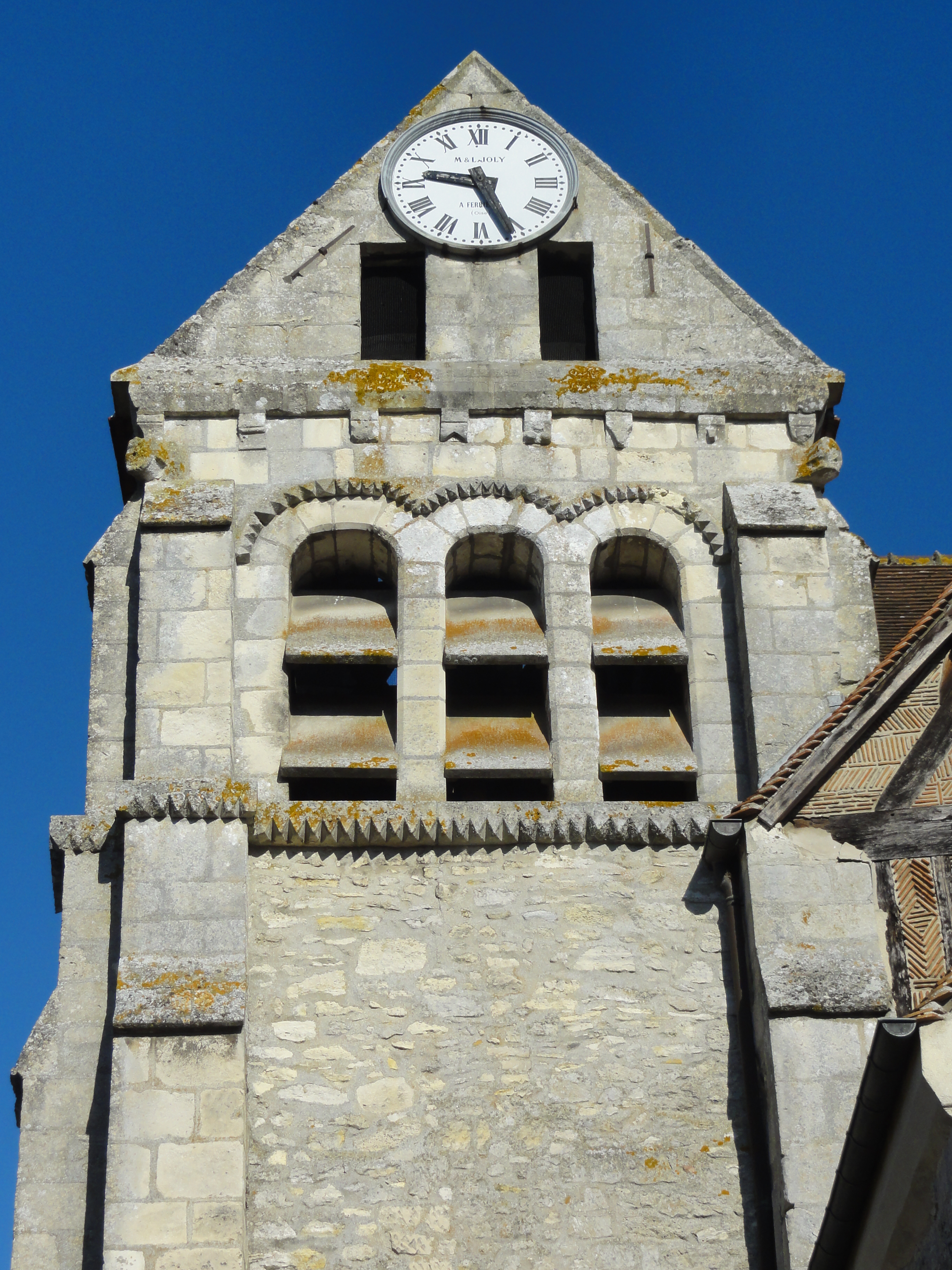 Église Saint-Nicolas de Raray (voir titre).